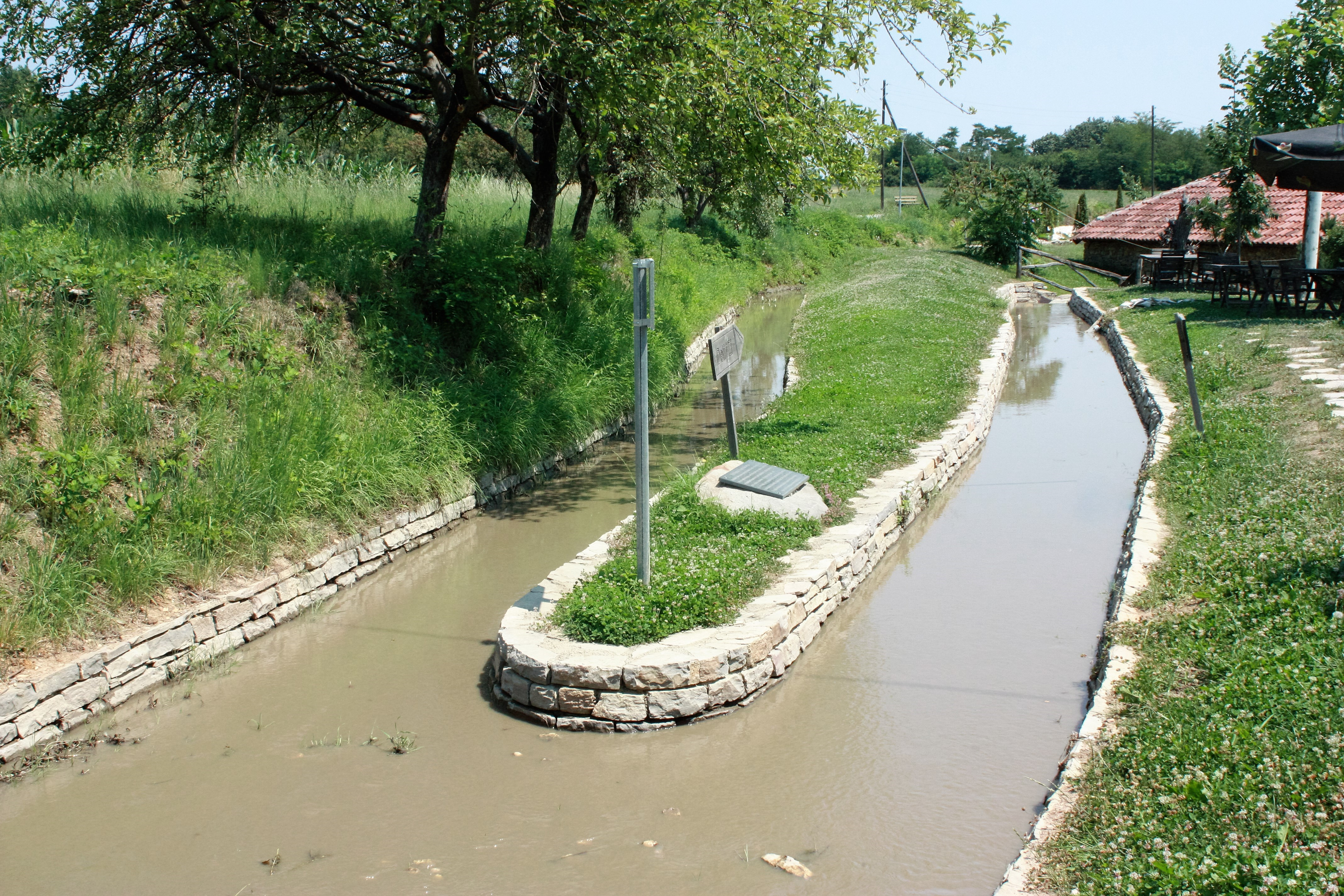 Forgreningen i Nerodime-elven ved Ferizaj.